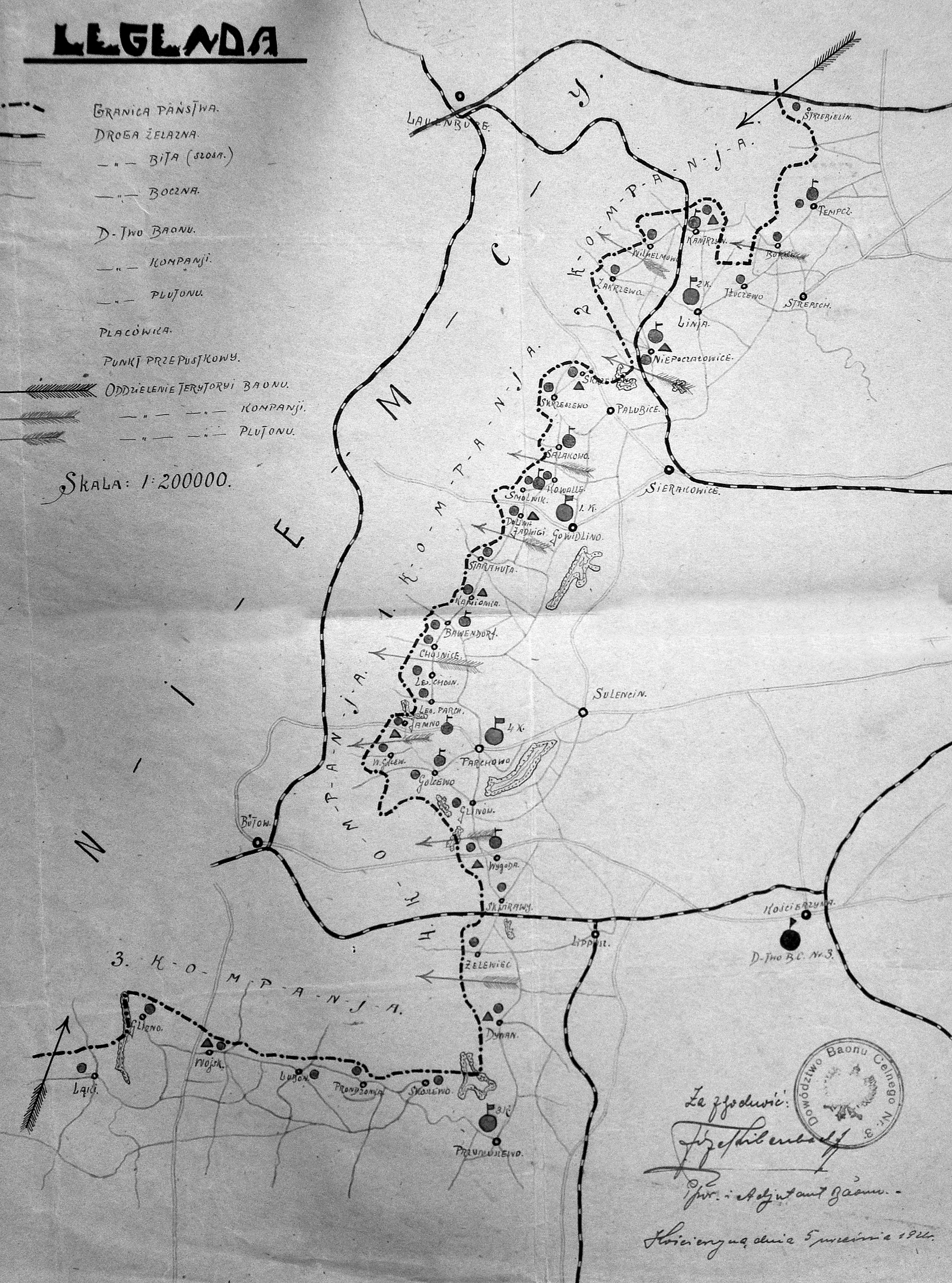 Szkic rozmieszczenia 3 batalionu celnego